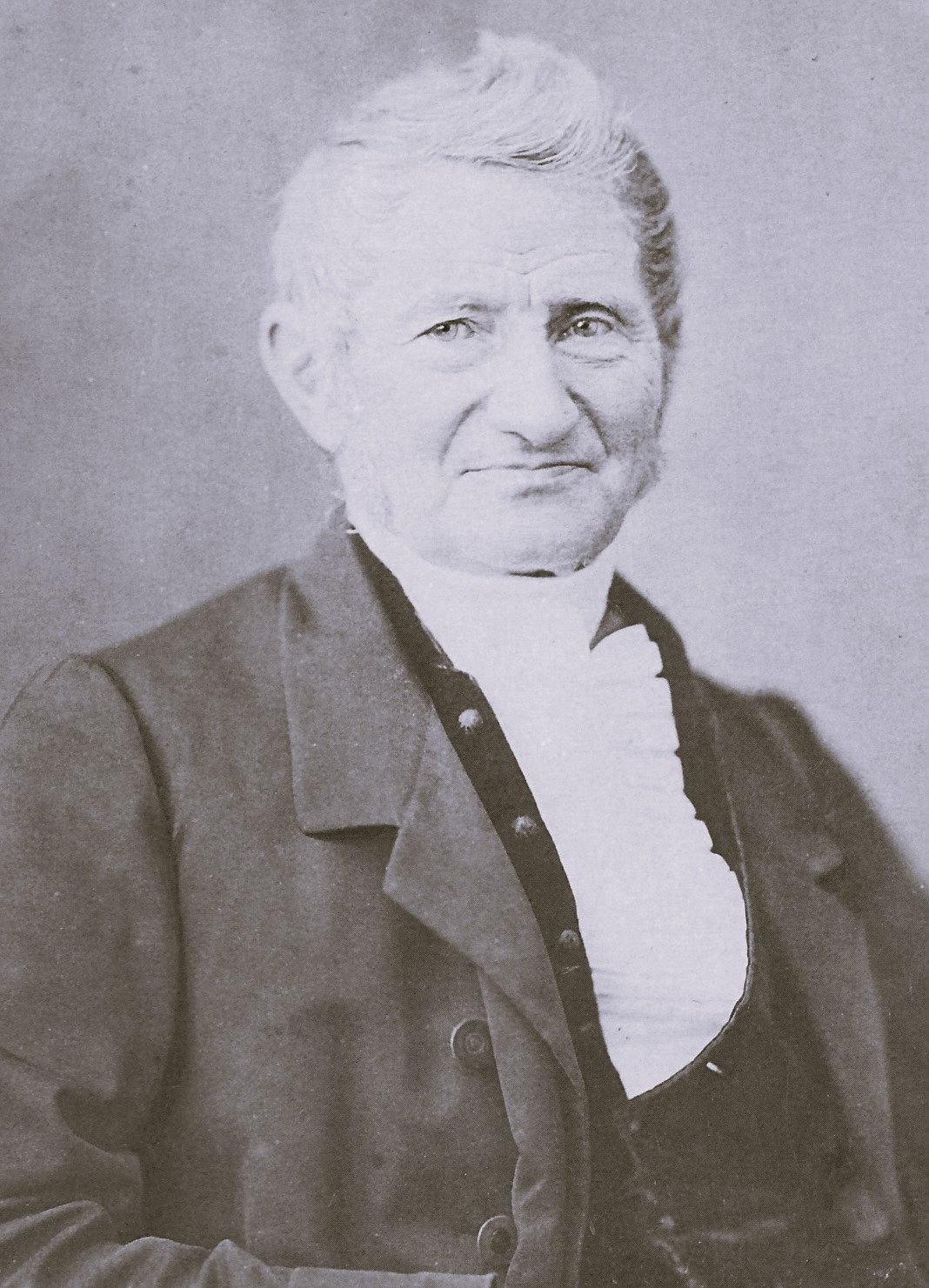 Georg Heinrich Nölting (* 3. März 1790 in Lübeck; † 3. April 1874 ebenda), Senator der Hansestadt Lübeck